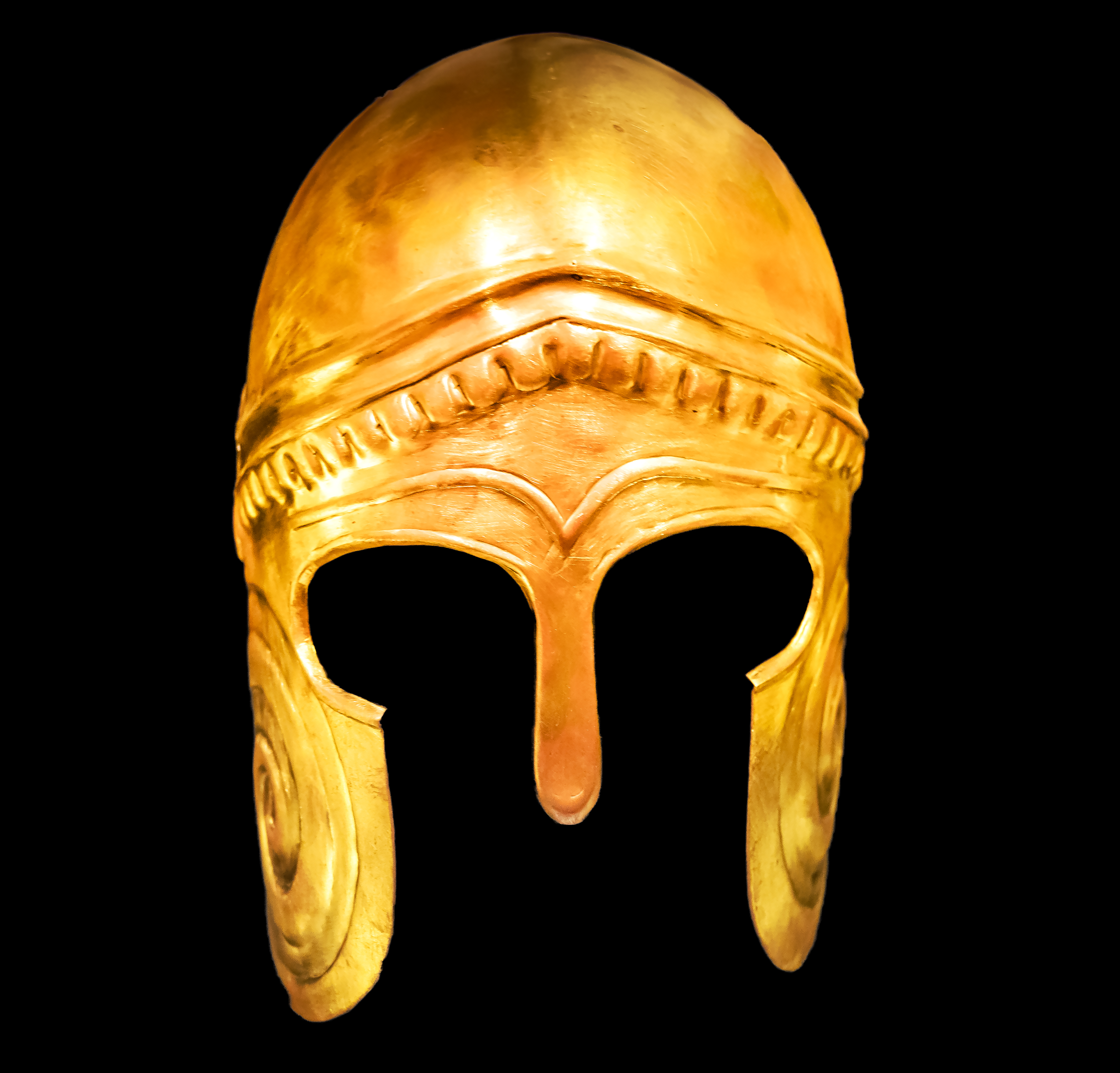 Moderne Nachbildung eines griechischen Helms aus dem 5. bis 4. Jahrhundert v. Chr. mit Kalottenabsatz, Scheitelgrat, Graten, Absätzen und Randborten nach Vorlage einer sizilliansichen Vase.